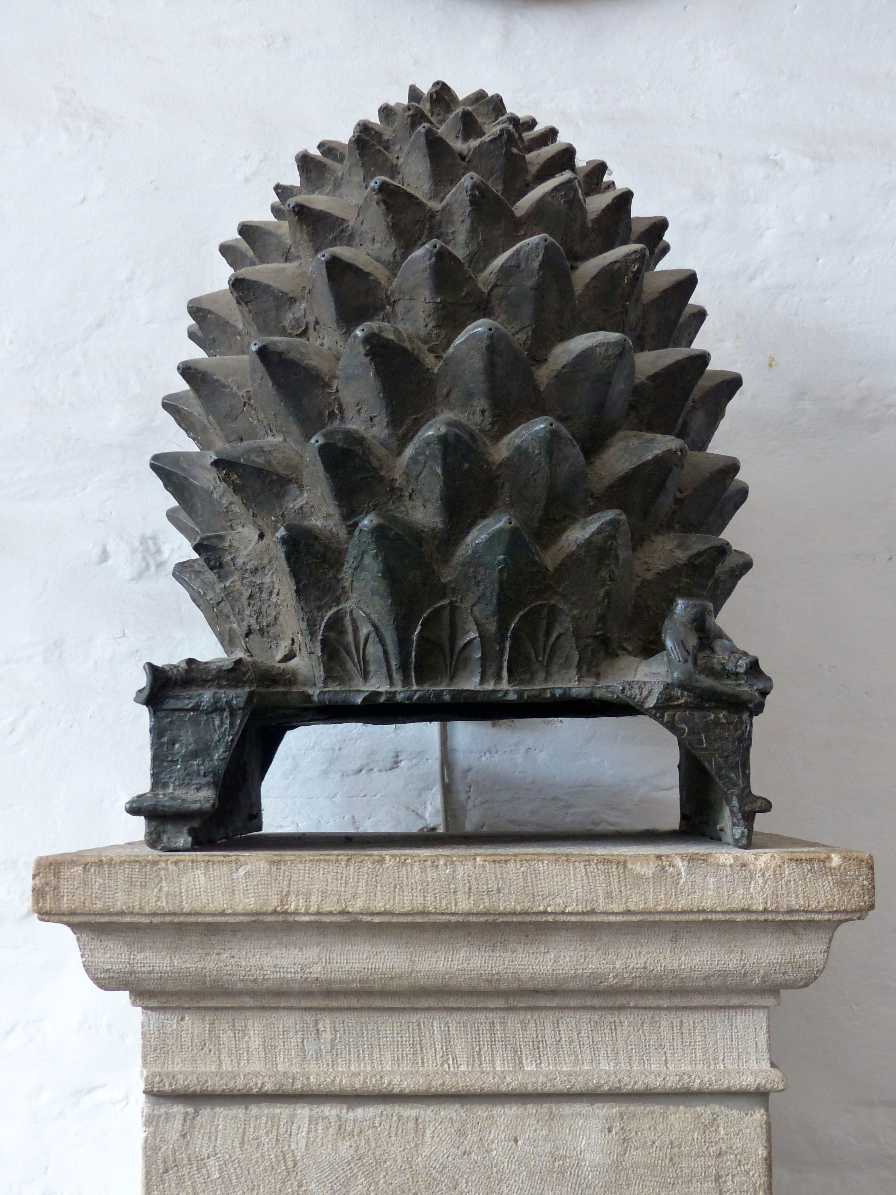 Aachener Dom: Pinienzapfen in der Eingangshalle